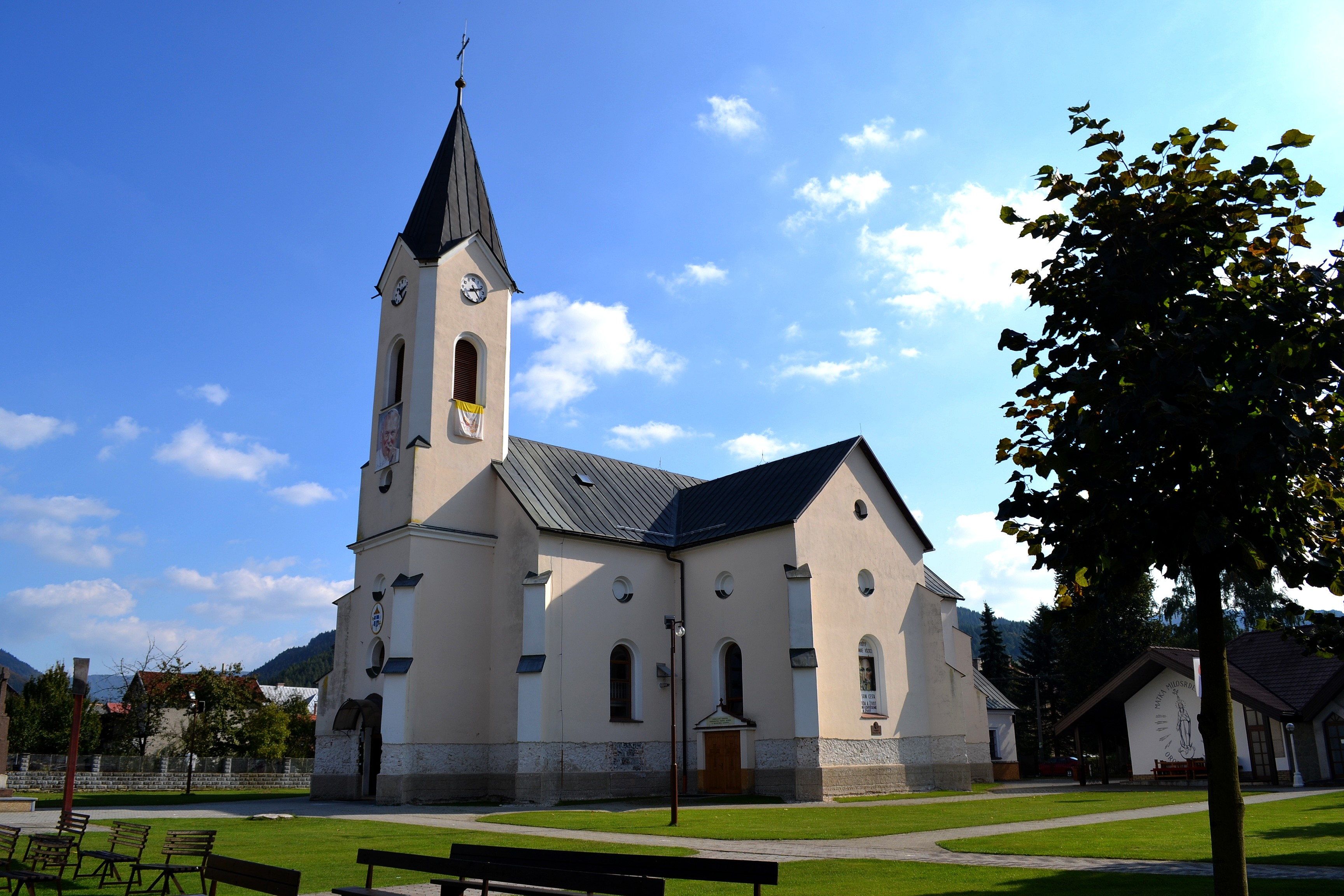 Rajecká Lesná (okr. Žilina), Bazilika Narodenia Panny Márie; celkový pohľad